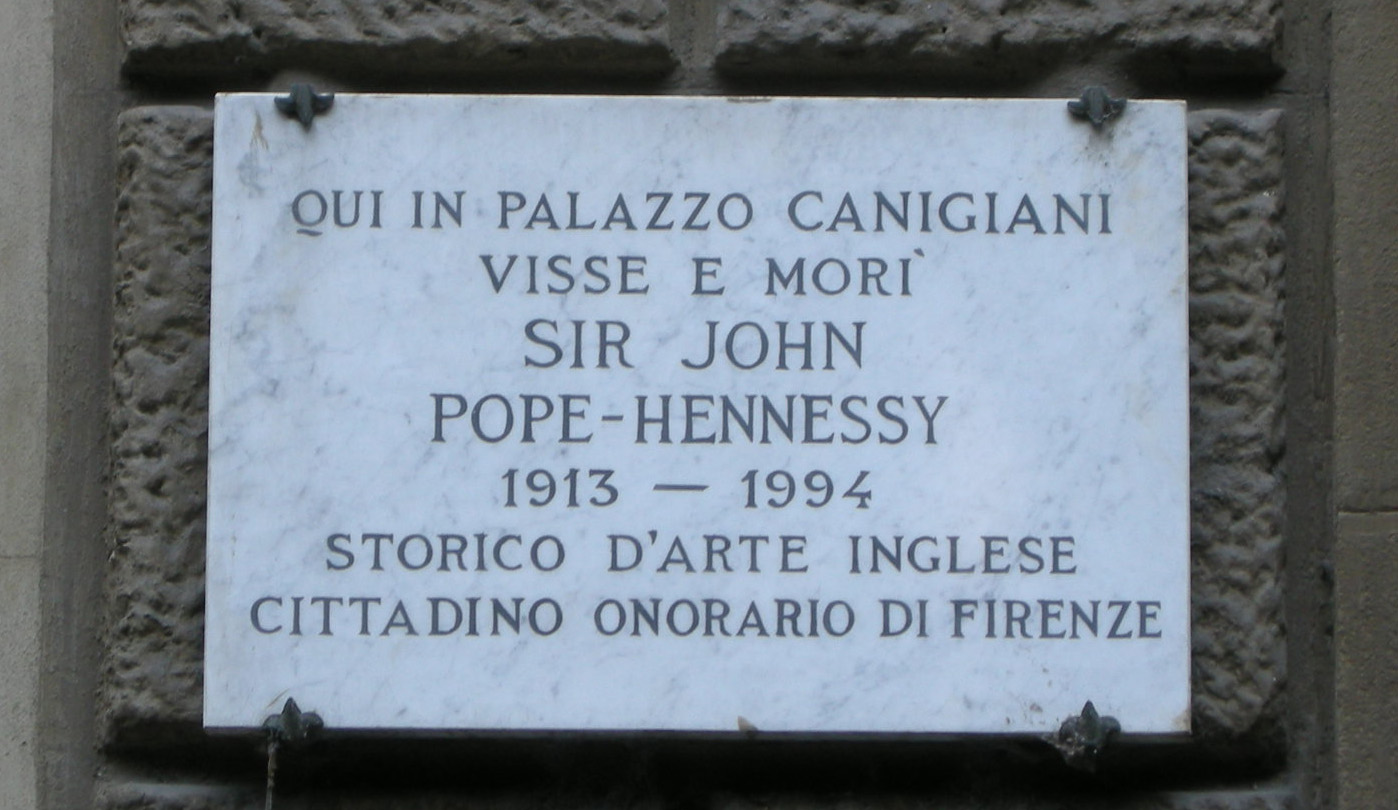 Via dei bardi, targa john pope-hennessy